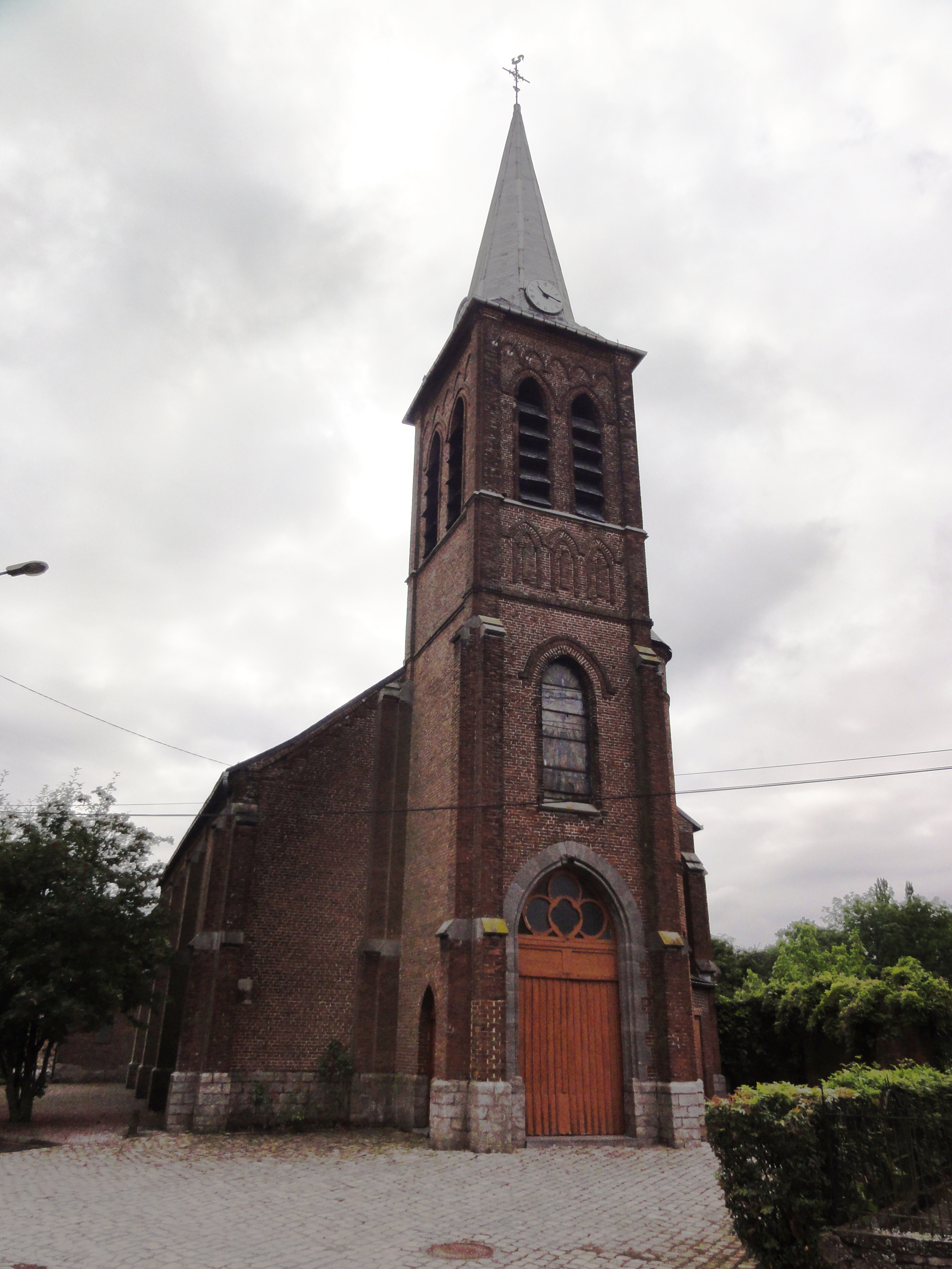 Ruesnes (Nord, Fr) église